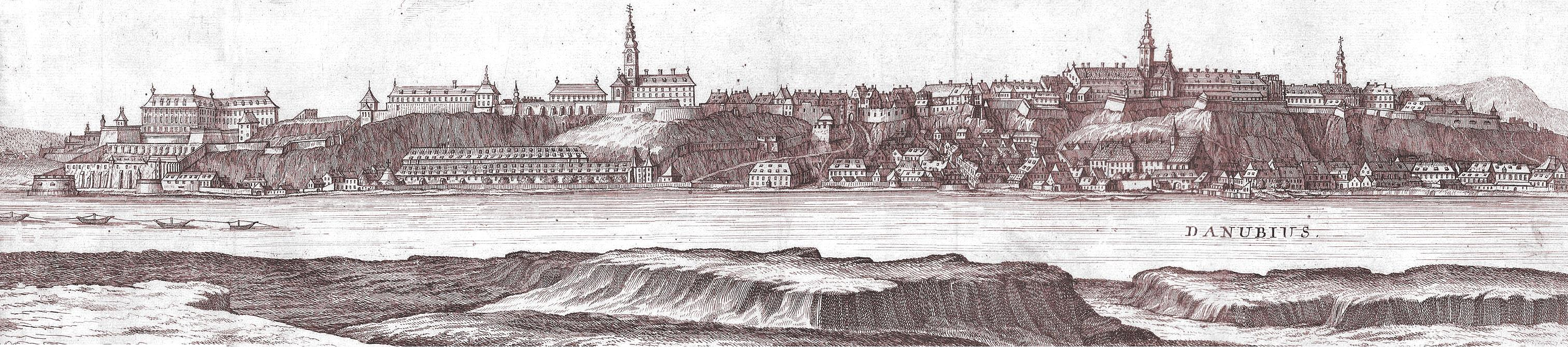 Buda és Pest látképe részlet Mikoviny Sámuel Notitiájából 1737